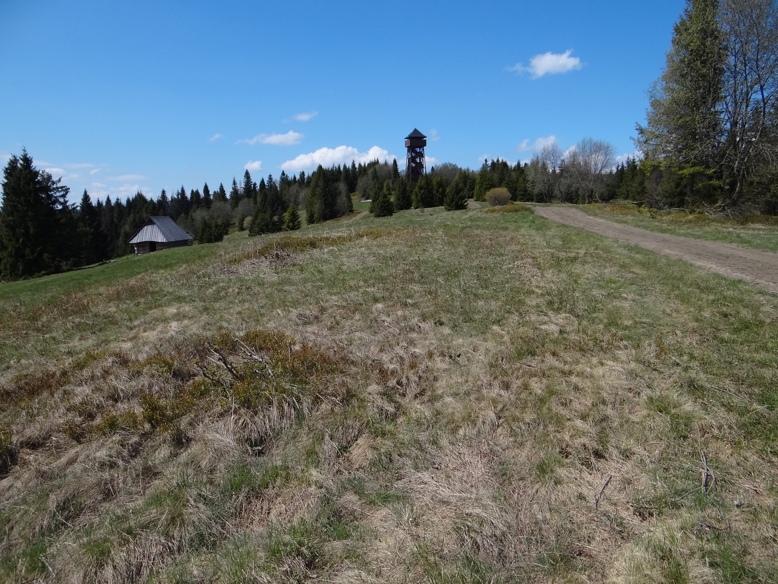 Magurki